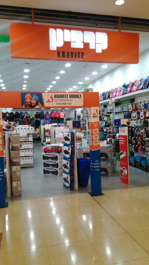 קרביץ, סניף הקריון